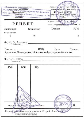 Образец рецептурного бланка ф. 148.